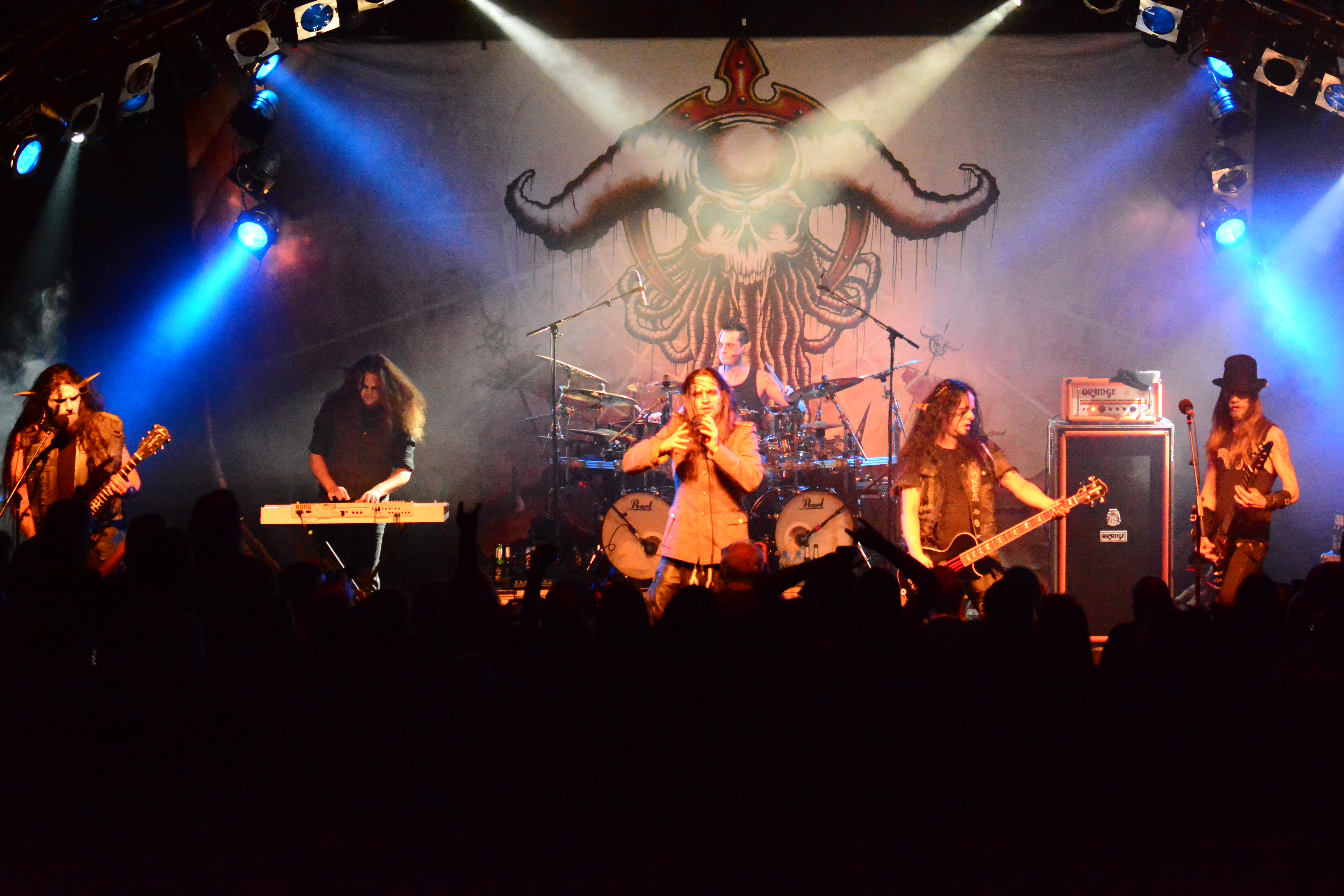 Finntroll bei den Hamburg Metal Dayz 2014